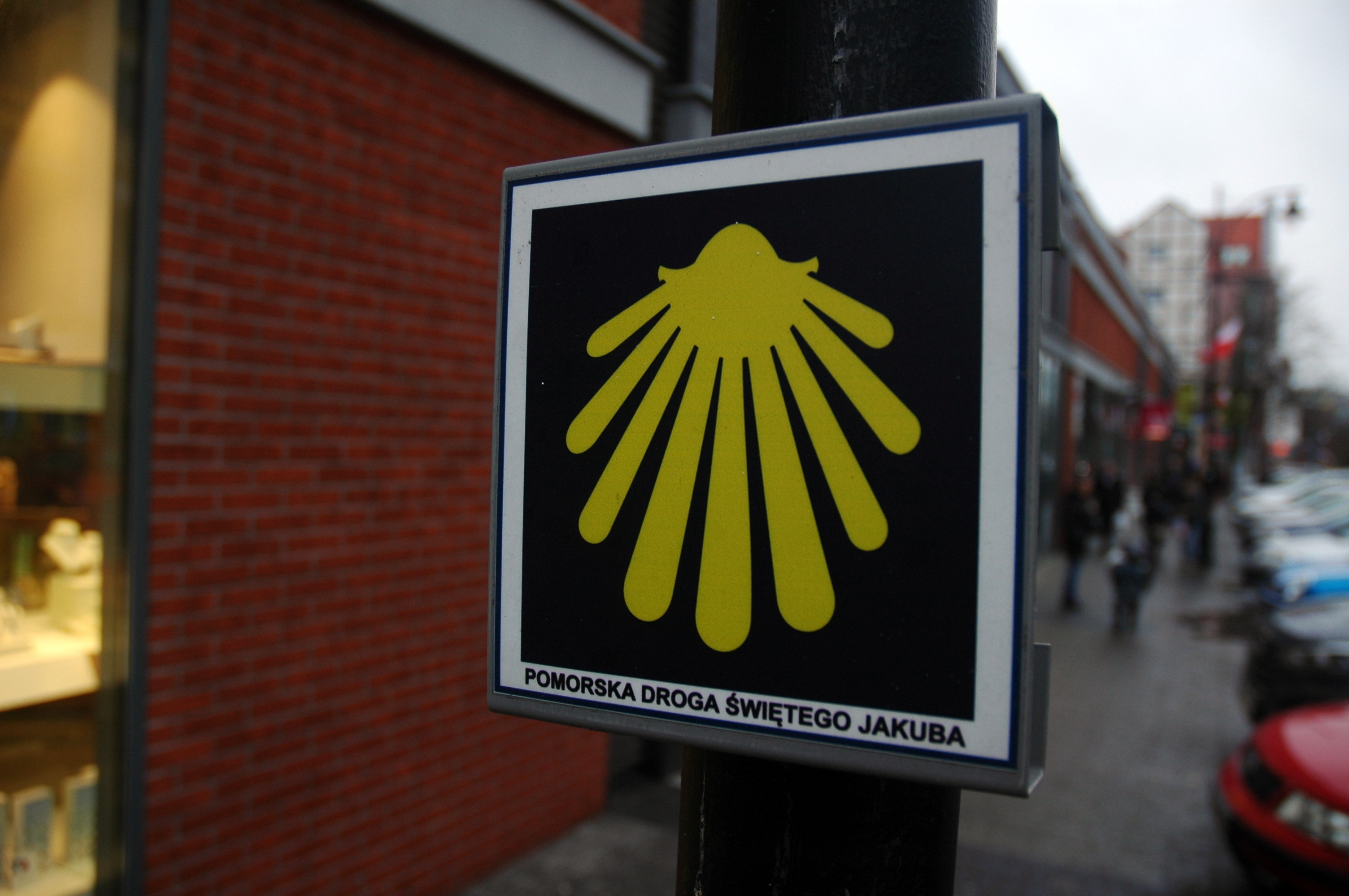 Kołobrzeg